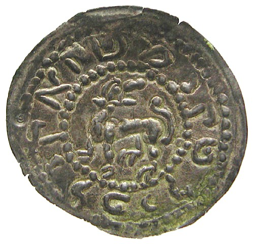 Brakteat "hebrajski" Mieszka III (czysta fotografia)